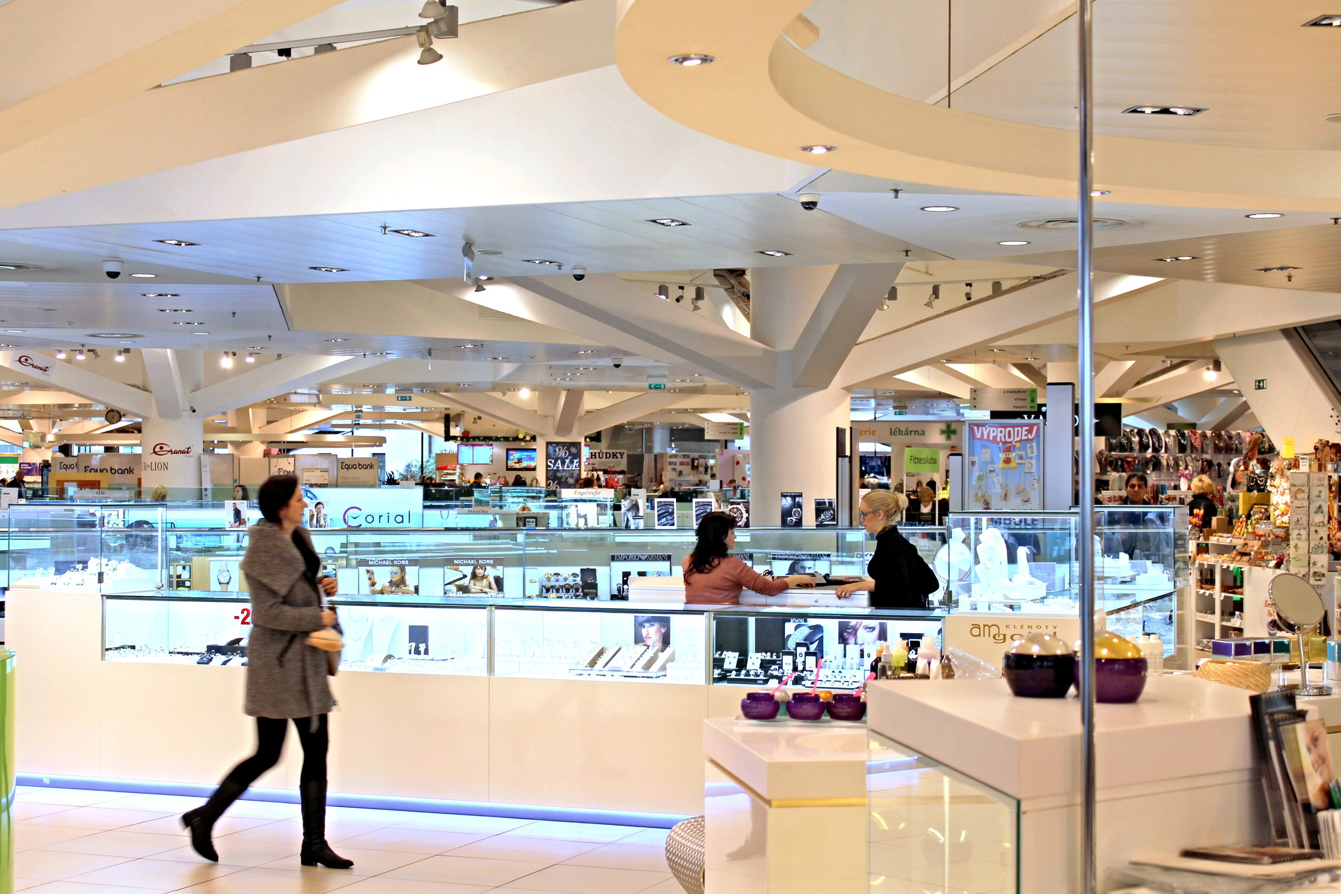 OD Kotva